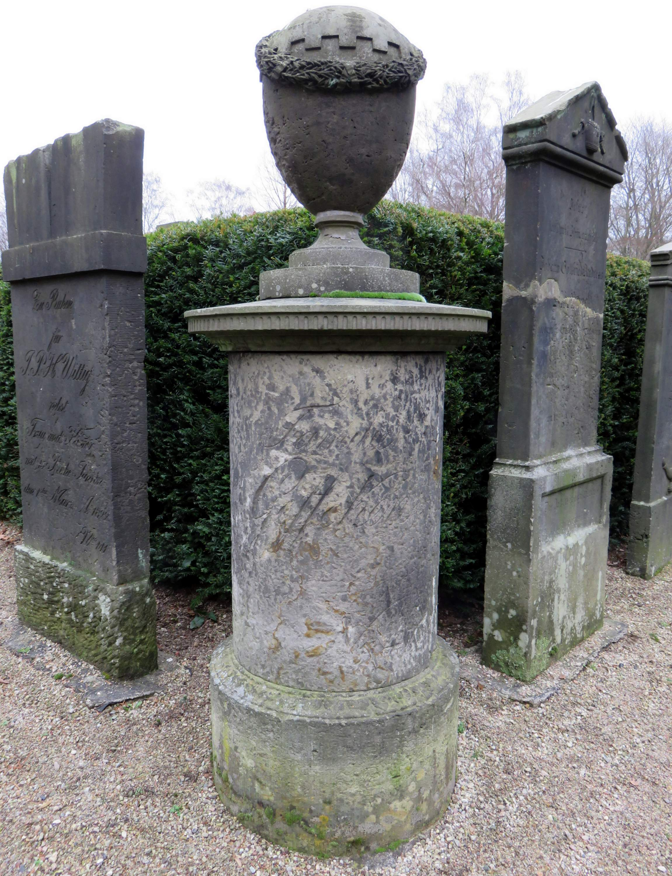 Grabmal für den Hamburger Kaufmann und Senator Heinrich Geffcken (1792 – 1861) im Grabmal-Freilichtmuseum Heckengarten auf dem Hamburger Friedhof Ohlsdorf, Inschrift bei .